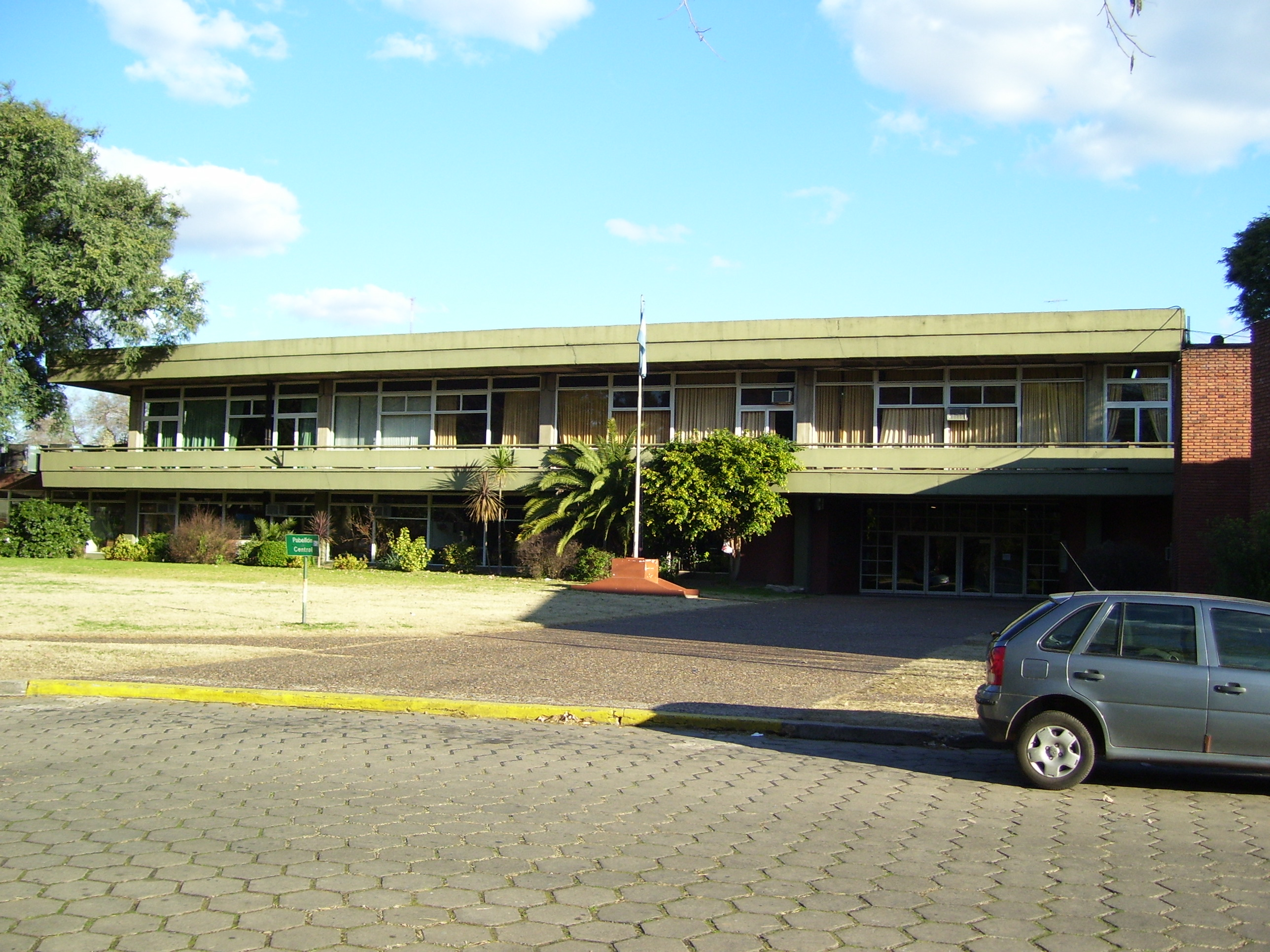 Facultad de Veterinaria. Pabellón Central. Universidad de Buenos Aires